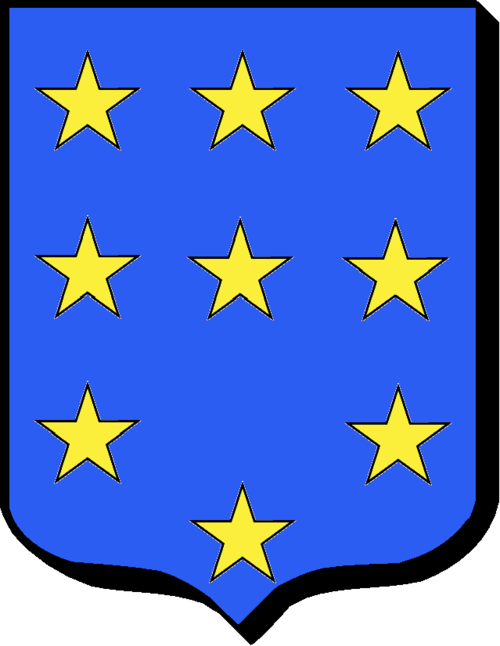 D'azur, à neuf étoiles d'or posées 3, 3, 2 et 1.